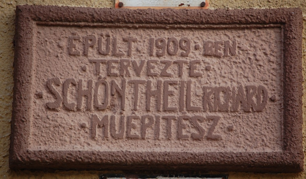 Schöntheil Richárd által tervezett lakóház emléktáblája a Petrőczy utca 26. alatt (Budapest, X. kerület, Magyarország)